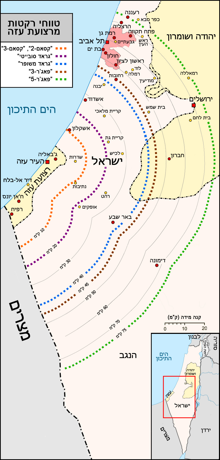 מפת טווחי רקטות מרצועת עזה